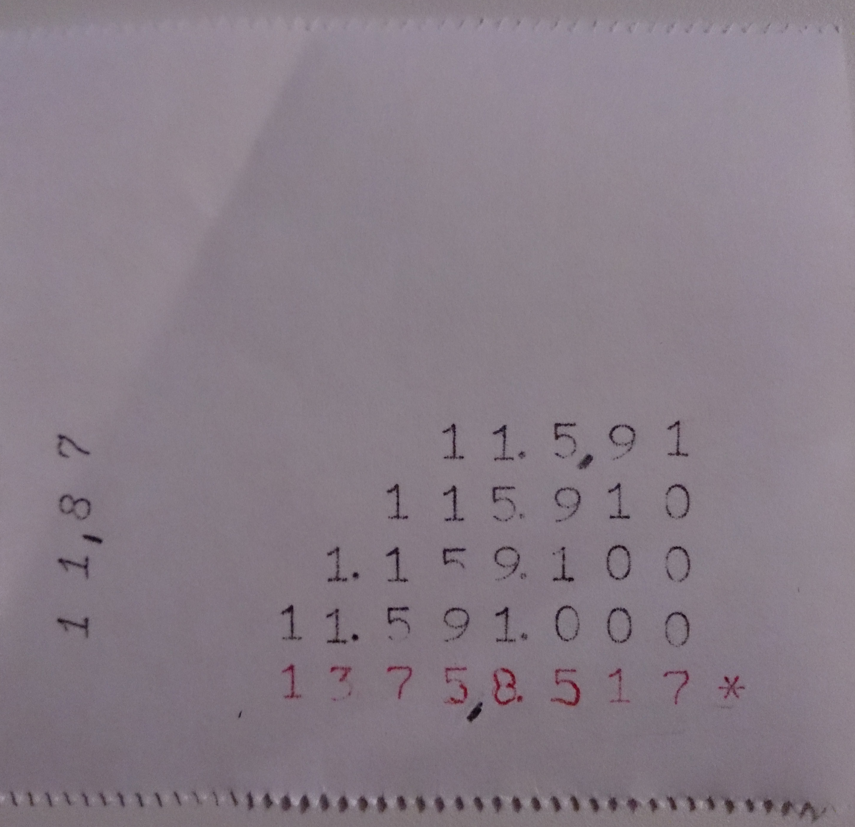 la stampa di una moltiplicazione eseguita con la divisumma 14; foto mia